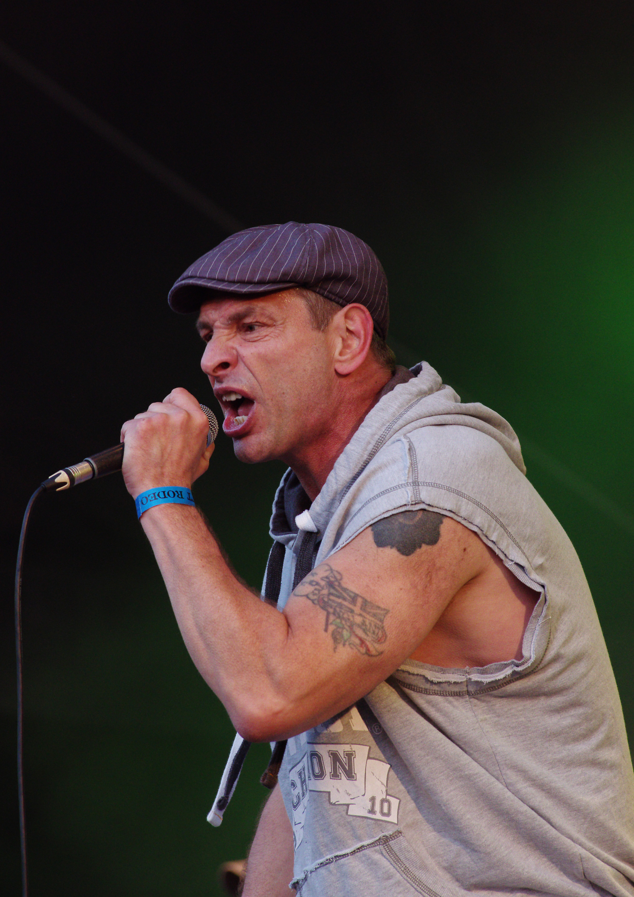 Cockney Rejects beim Ruhrpott Rodeo 2013 in Hünxe. Jeff Geggus , alias Jeff Turner, alias "Stinky" Turner (Gesang)